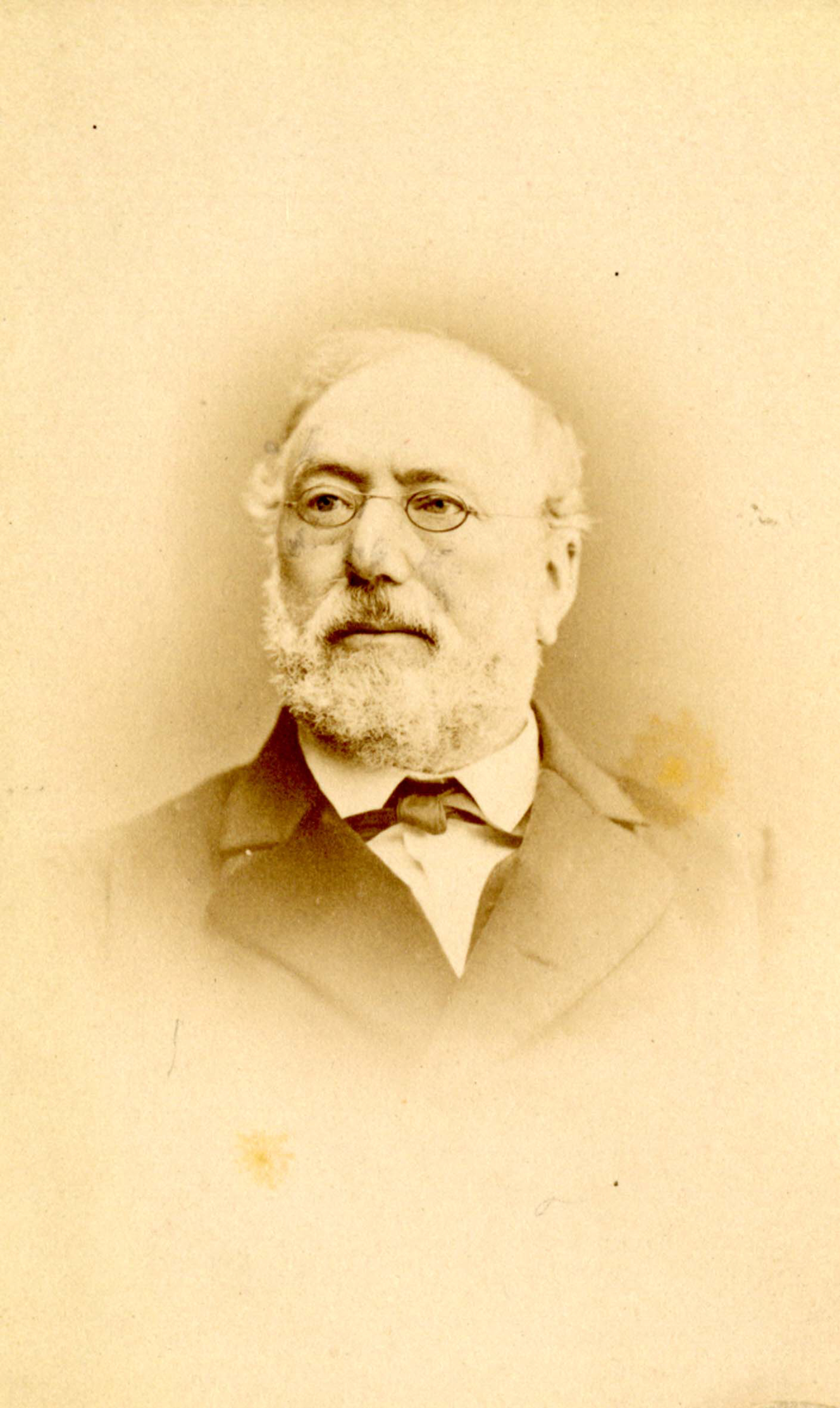 Anton Carteret, um 1880